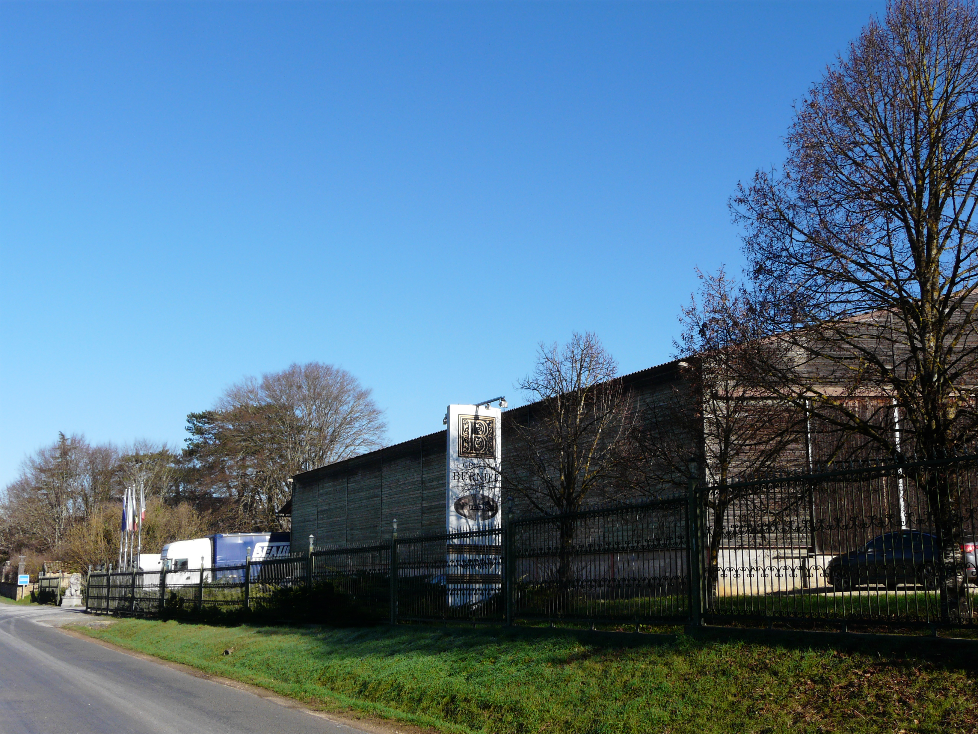 Bâtiments industriels de l'entreprise Bernier, Saint-Jory-las-Bloux, Dordogne, France.